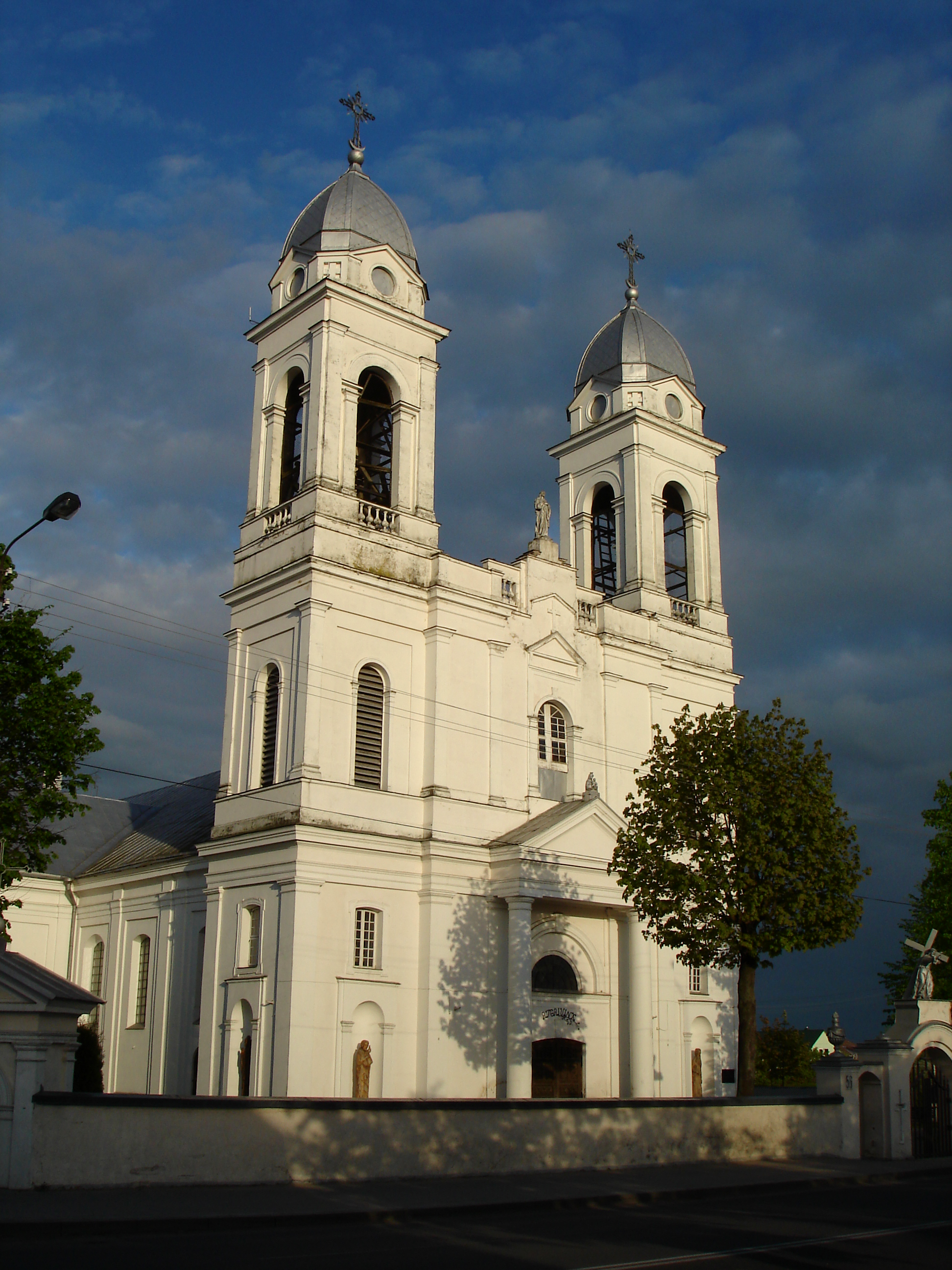 Litauen: Kirche in Garliava